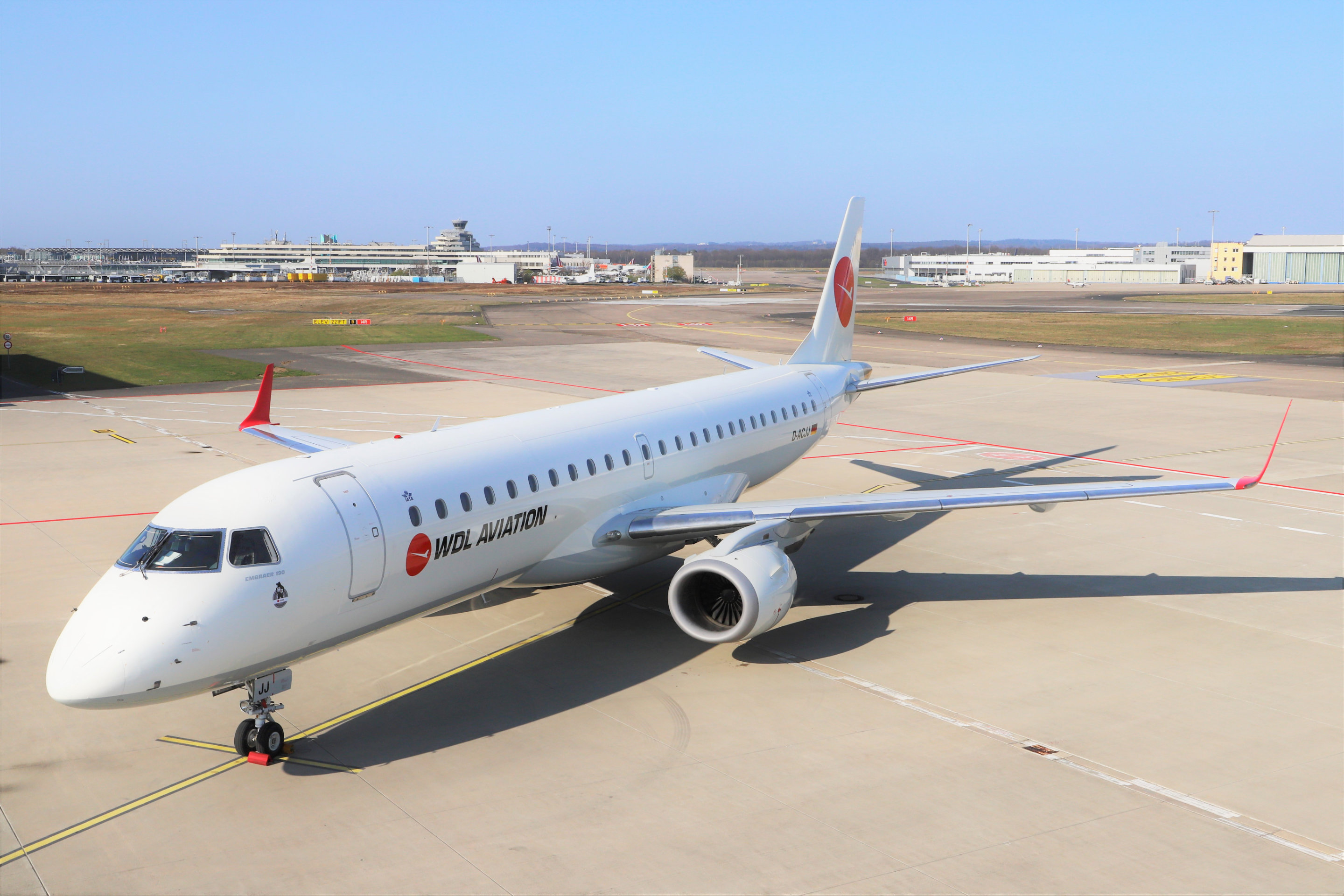 WDL-Aviation Embraer E190